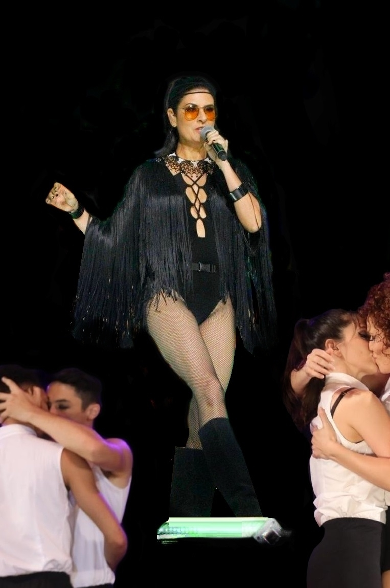 Fernanda Abreu durante show em 2020